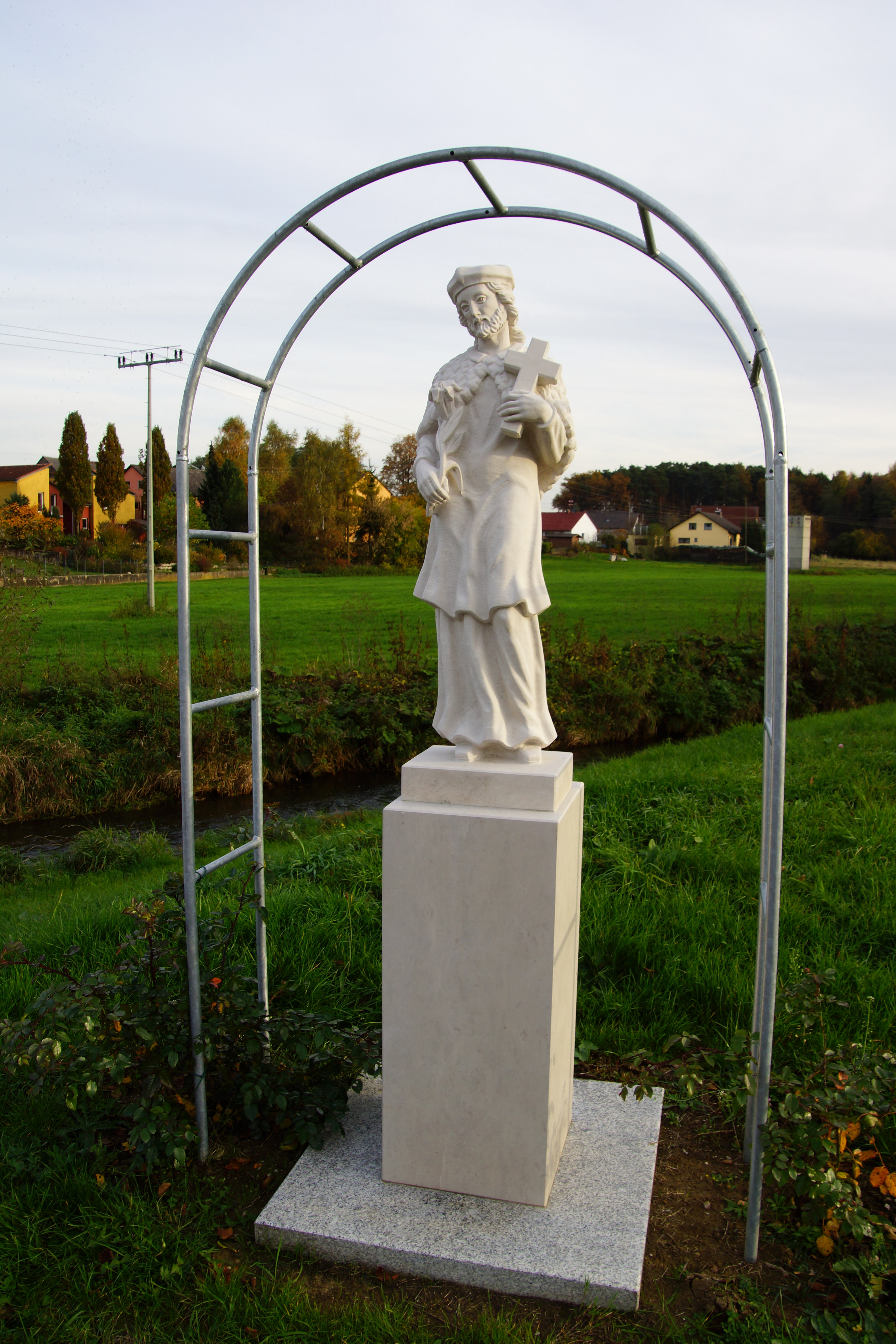 Richtheim - Gemeinde Berg bei Neumarkt in der Oberpfalz